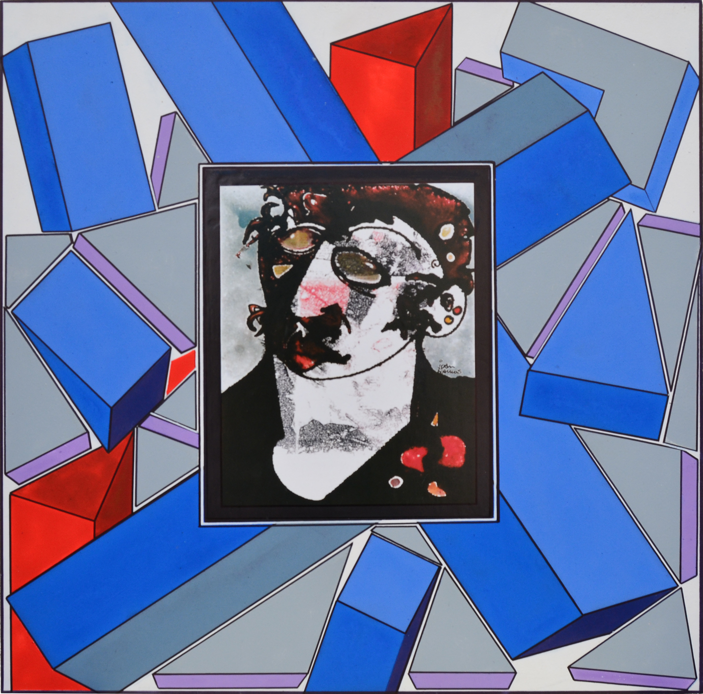 Obra realizada sobre tabla por Joan Ramos en el año 2012